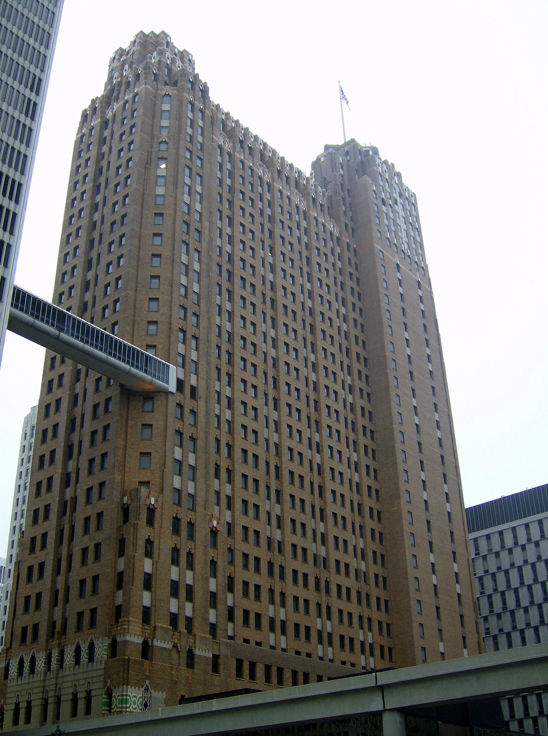 Guardian Building, Detroit MI